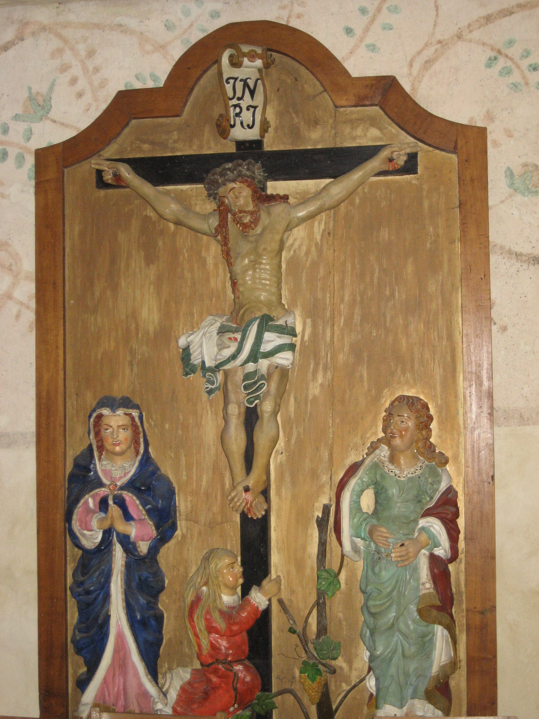 Die geschnitzte Kreuzigungsgruppe des ehemaligen Altaraufsatzes an der Westwand der Zerrenthiner Kirche.